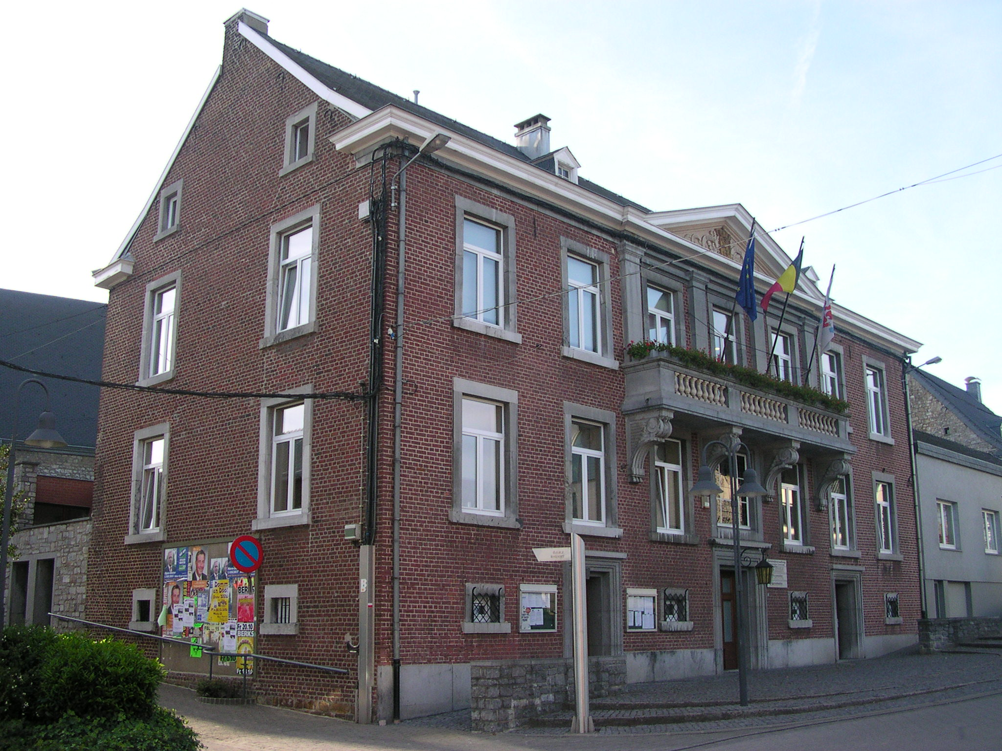 Raeren, Rathaus